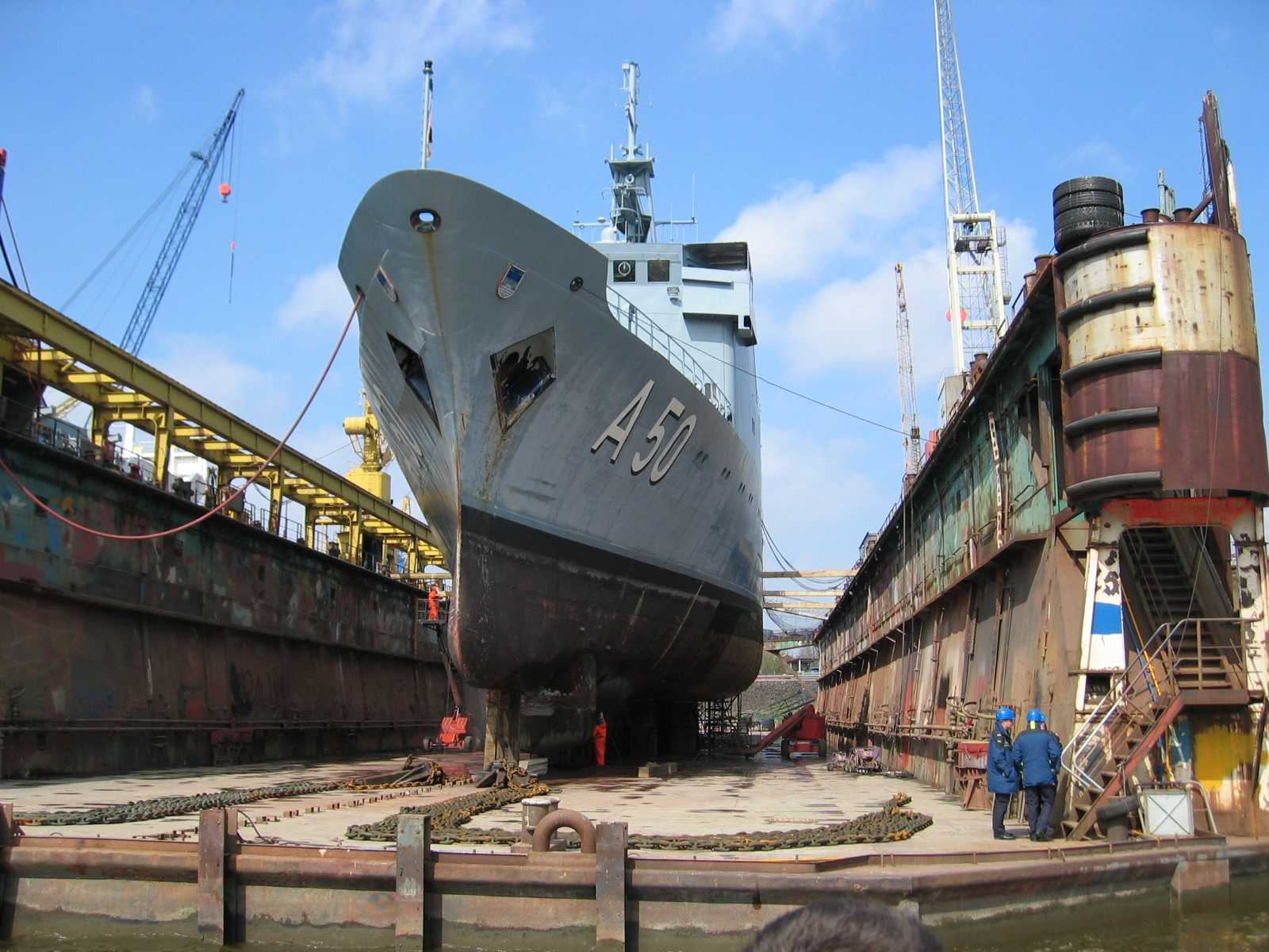 Flottendienstboot A50 der Bundesmarine, 2012 auf einer Werft in Hamburg